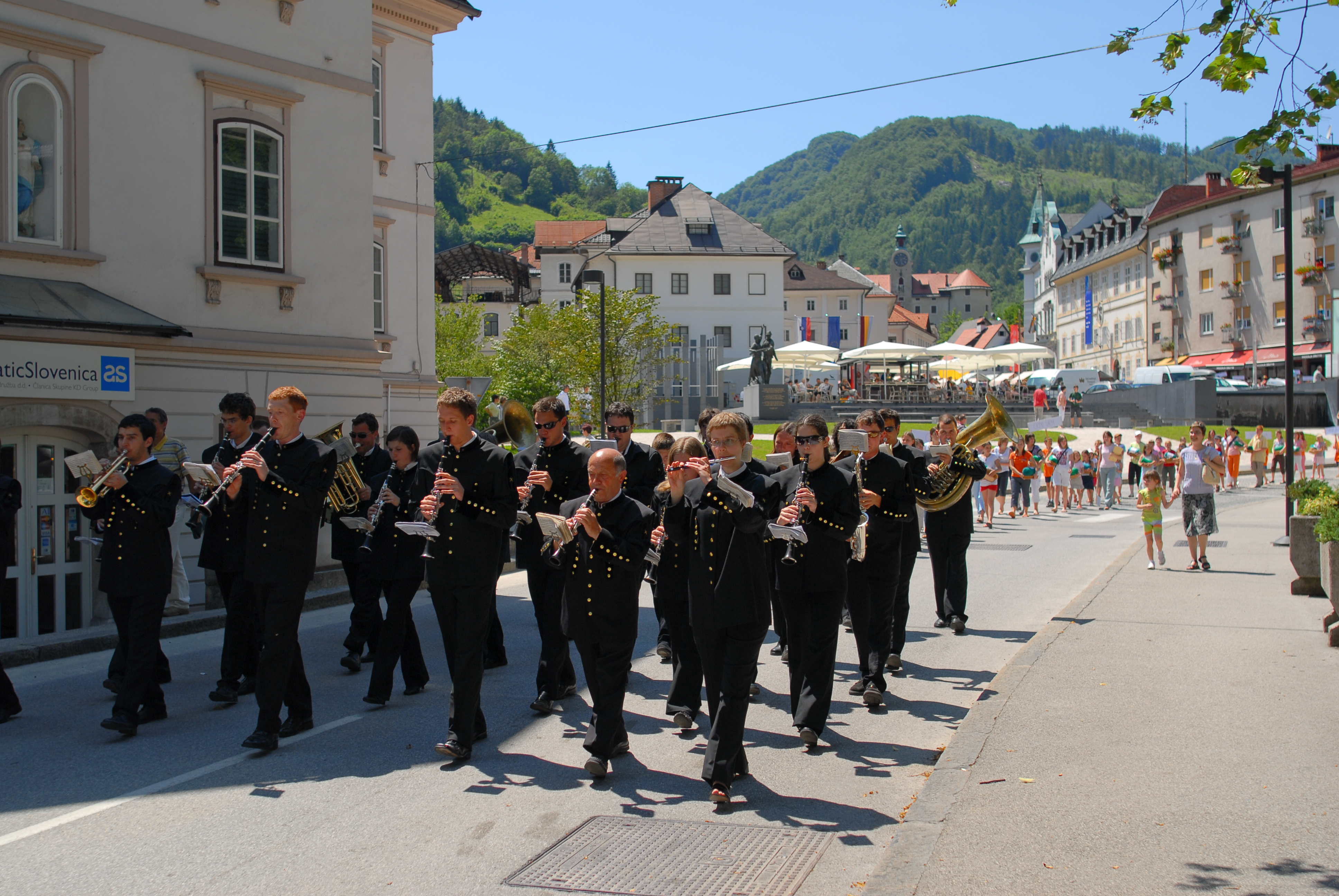 Godbeno društvo rudarjev Idrija.